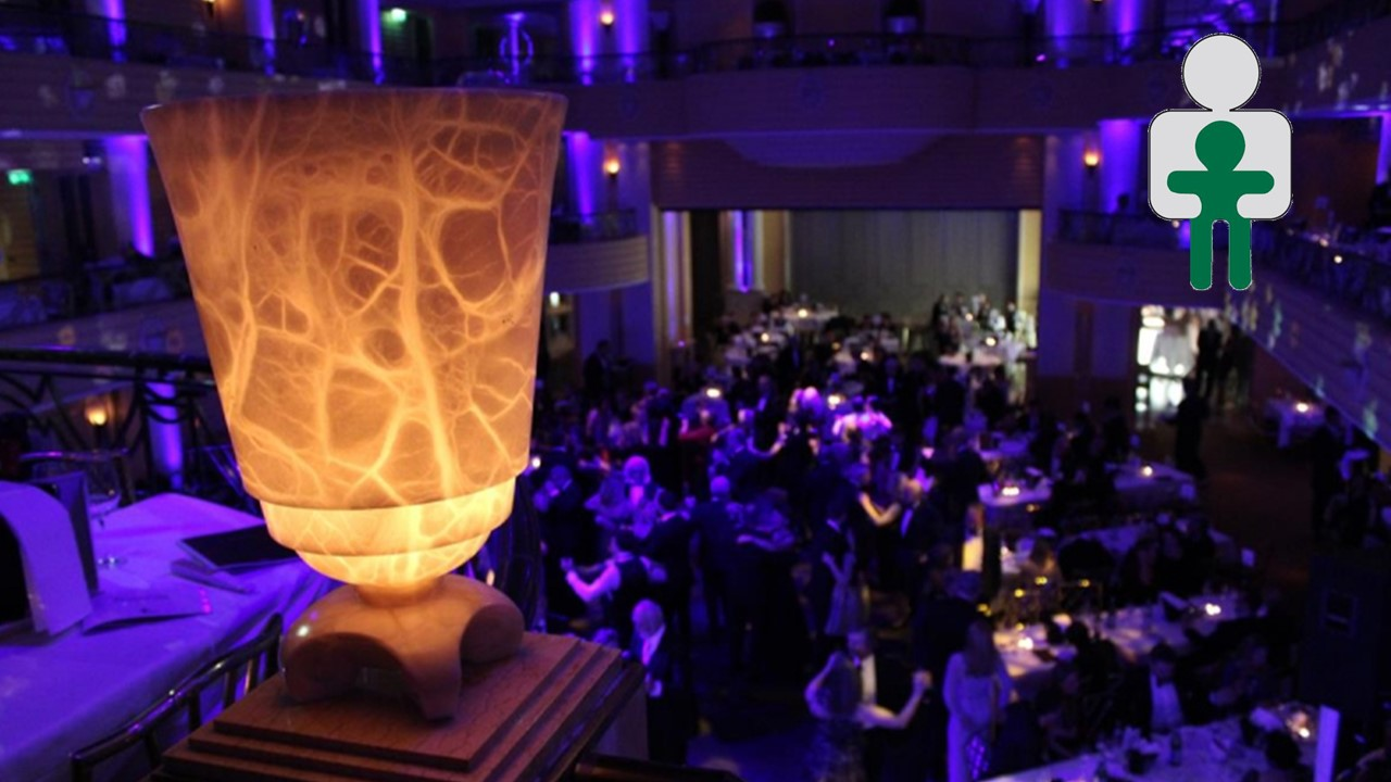 Münchner Soiree